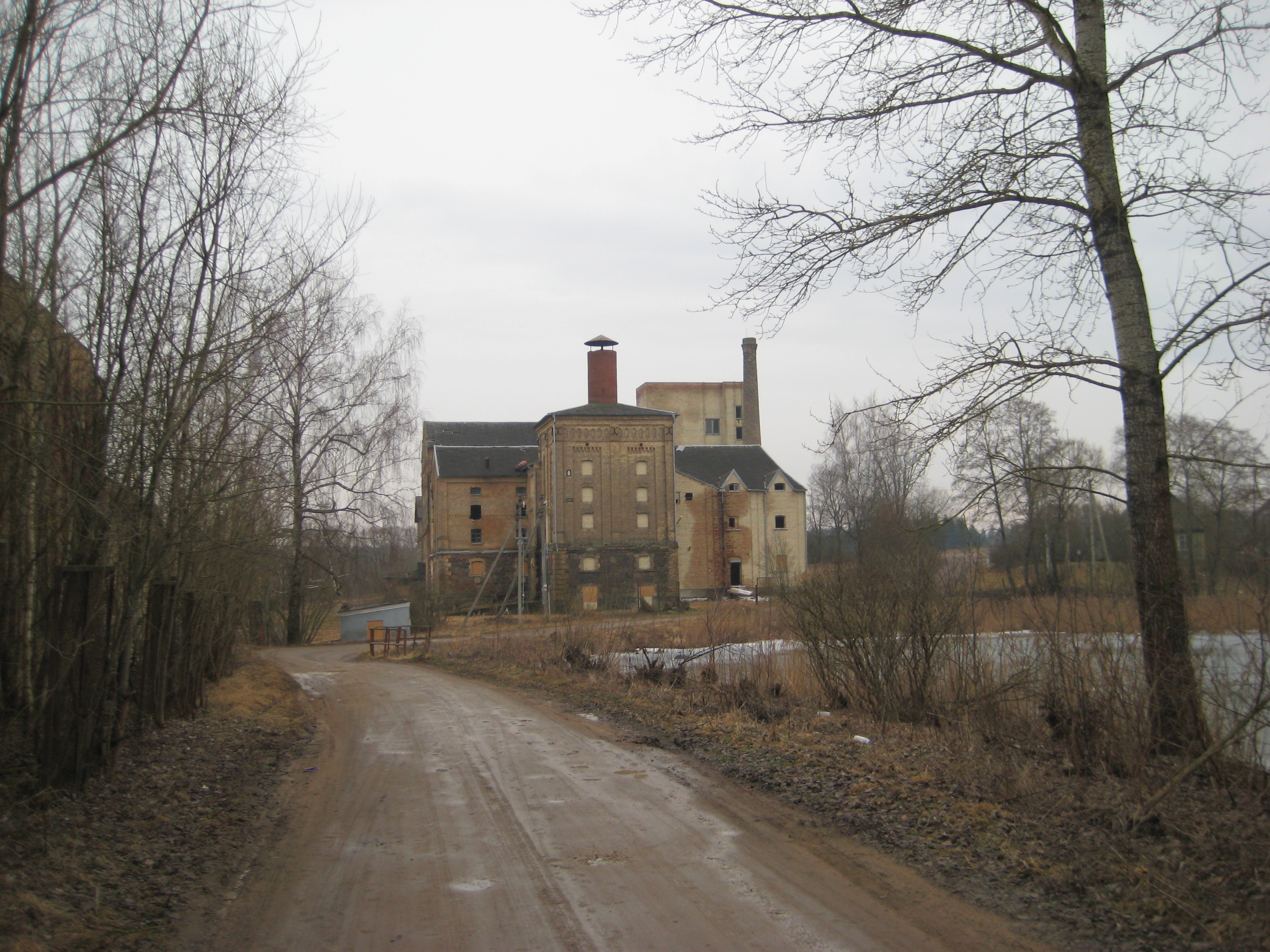 Raudondvaris 15166, Lithuania